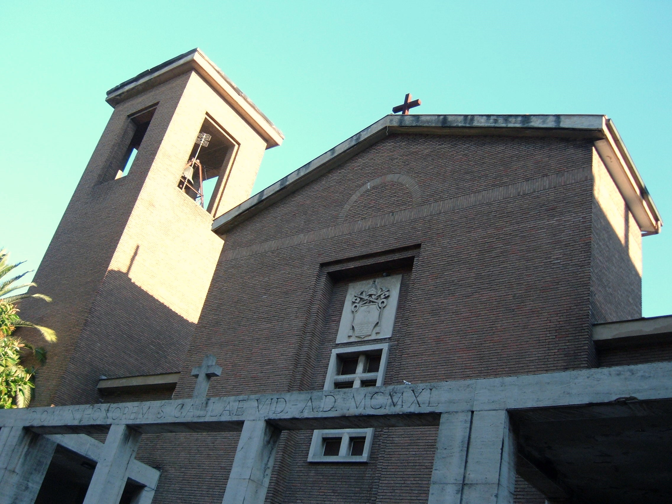 Chiesa di Santa Galla, a Roma, nel quartiere Ostiense, in circonvallazione Ostiense.